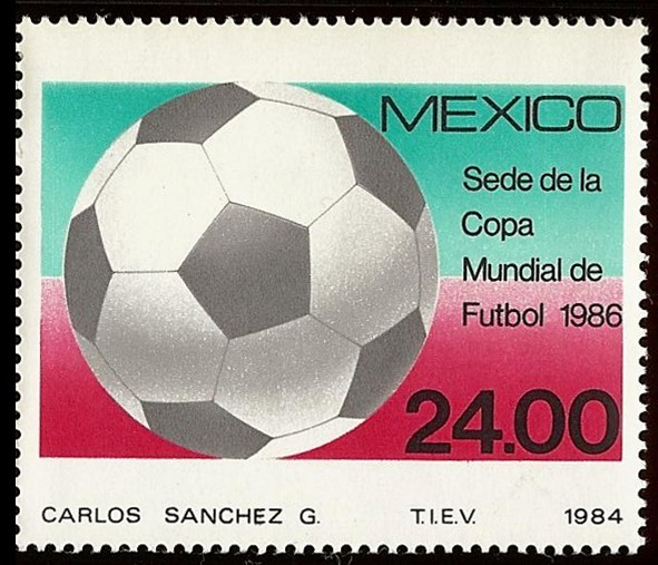 Estampilla alusiva a la designación de México como sede del Campeonato Mundial de Fútbol de 1986. Se muestra un balón sobre fondo de colores nacionales.